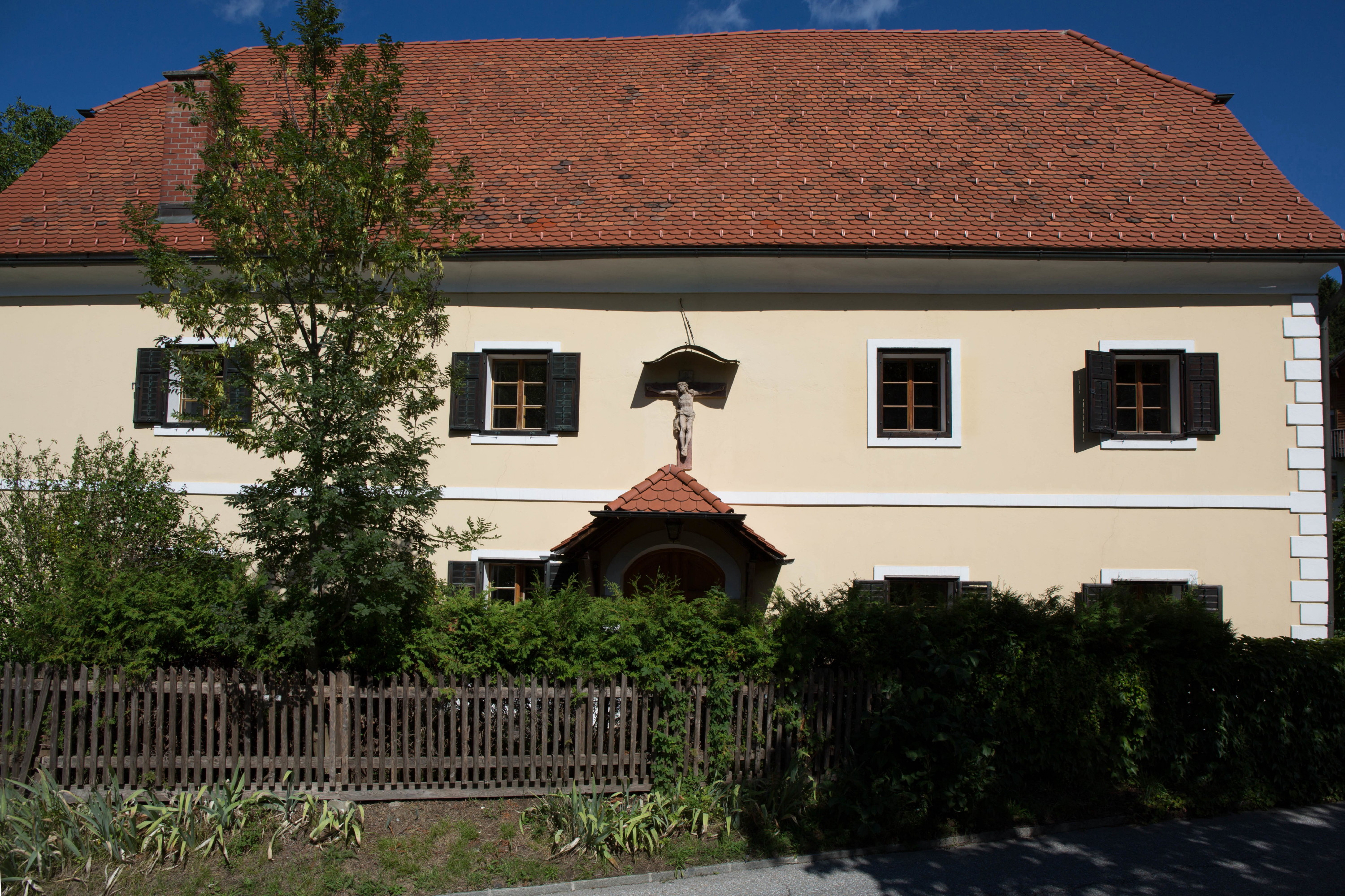 Ansitz Schackhof in Prenning, Gemeinde Deutschfeistritz.